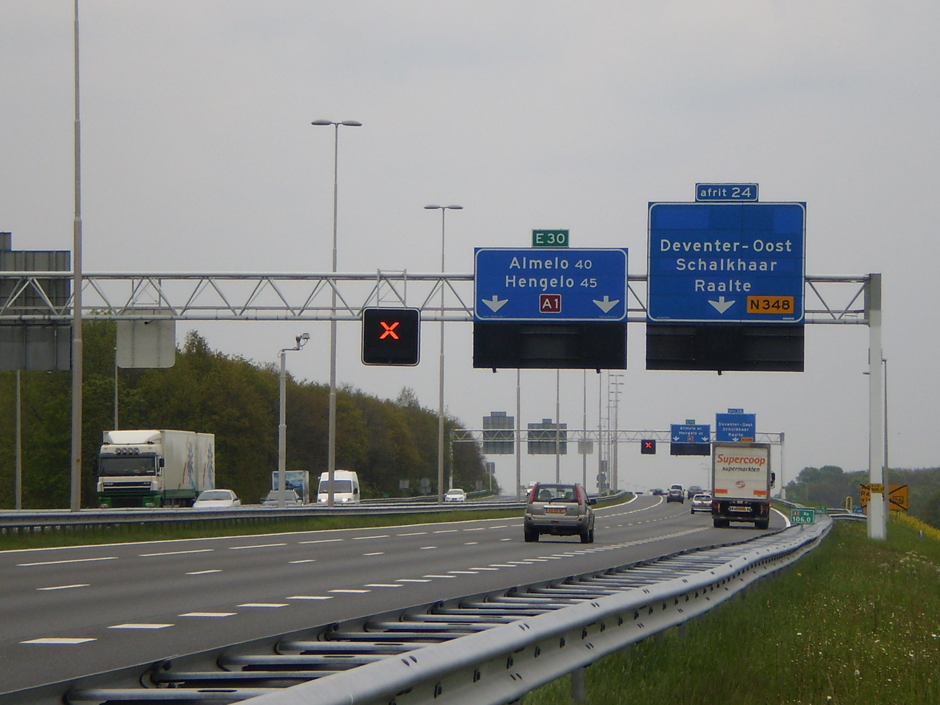 Rijksweg 1 ter hoogte van Deventer-Oost